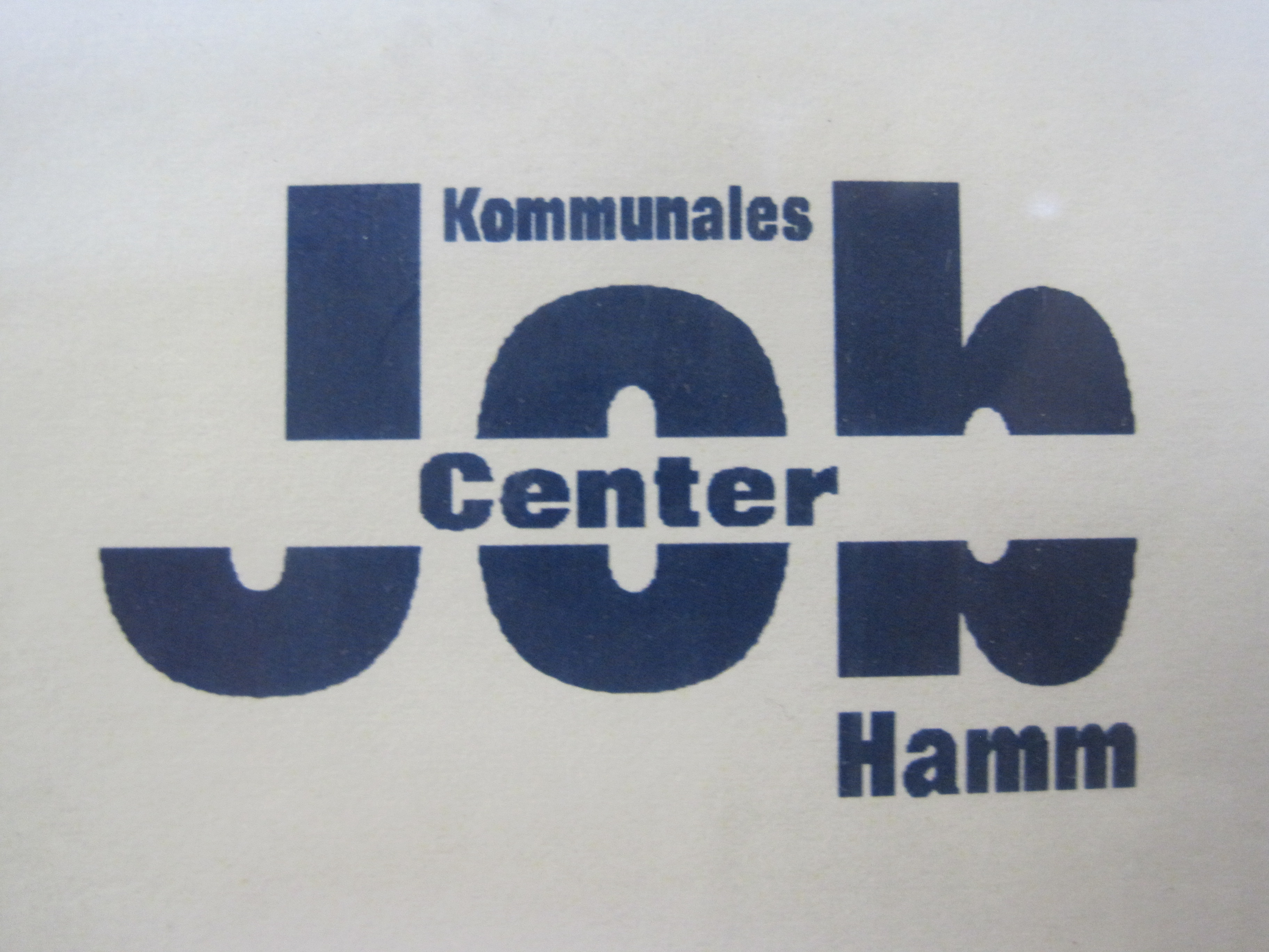 Das Foto zeigt das Logo des Kommunalen JobCenters Hamm.